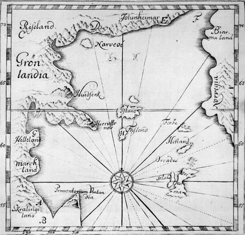 Carte du Groenland et du Vinland.